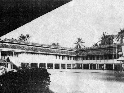 Bangunan Sekolah pada tahun 1927